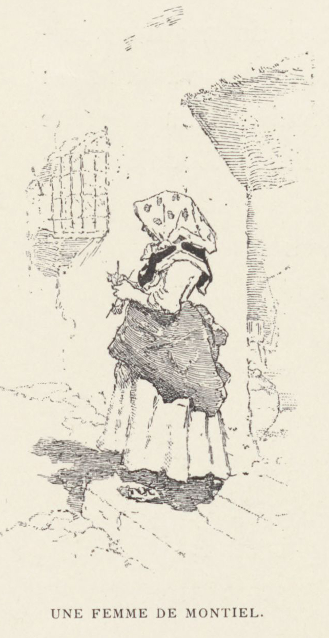 Une femme de Montiel.